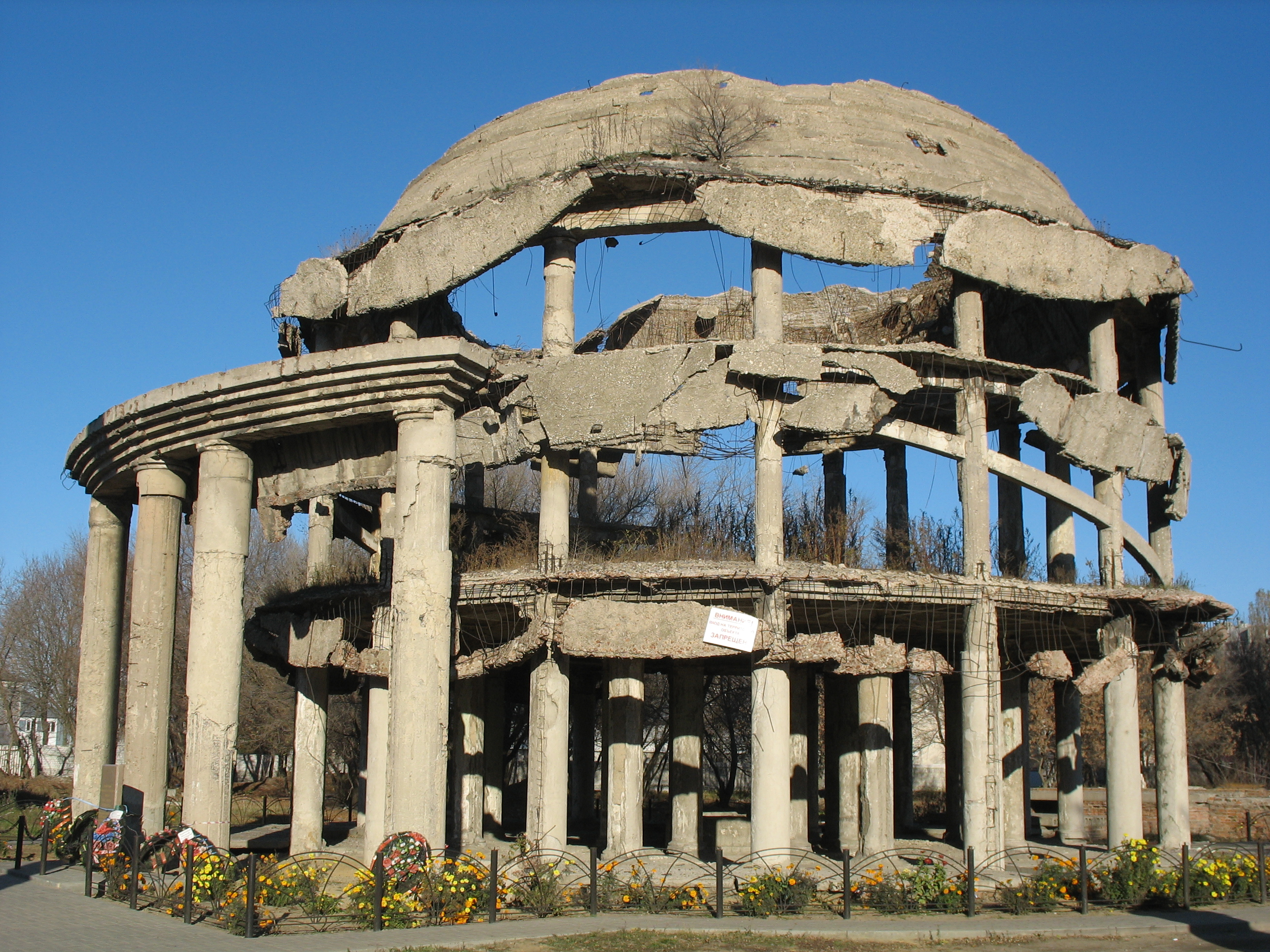 Ротонда (Воронеж) справа